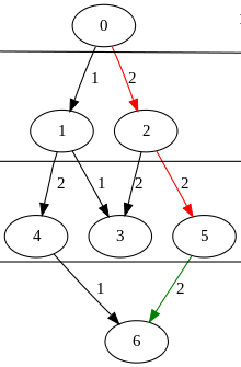 مثال بلند ترین مسیر